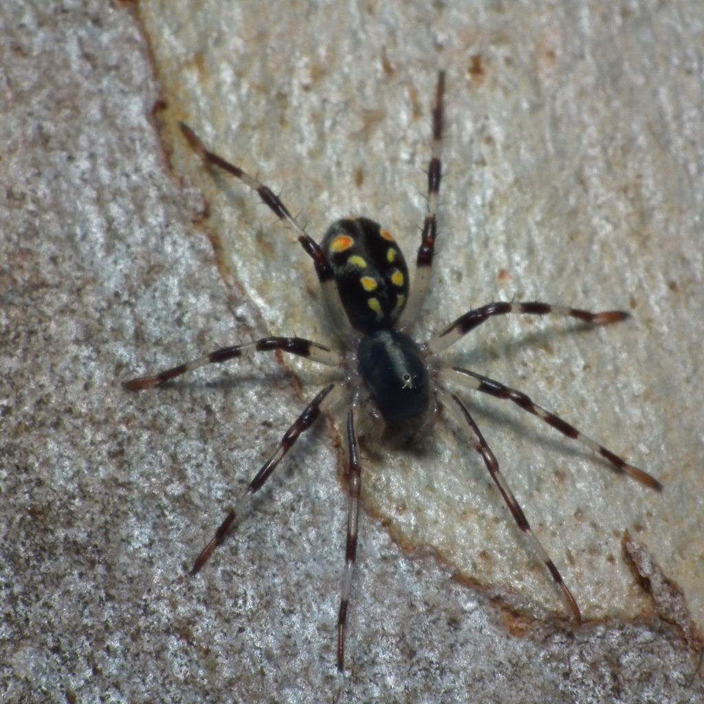 Subasteron daviesae in Brisbane, Queensland, Australia